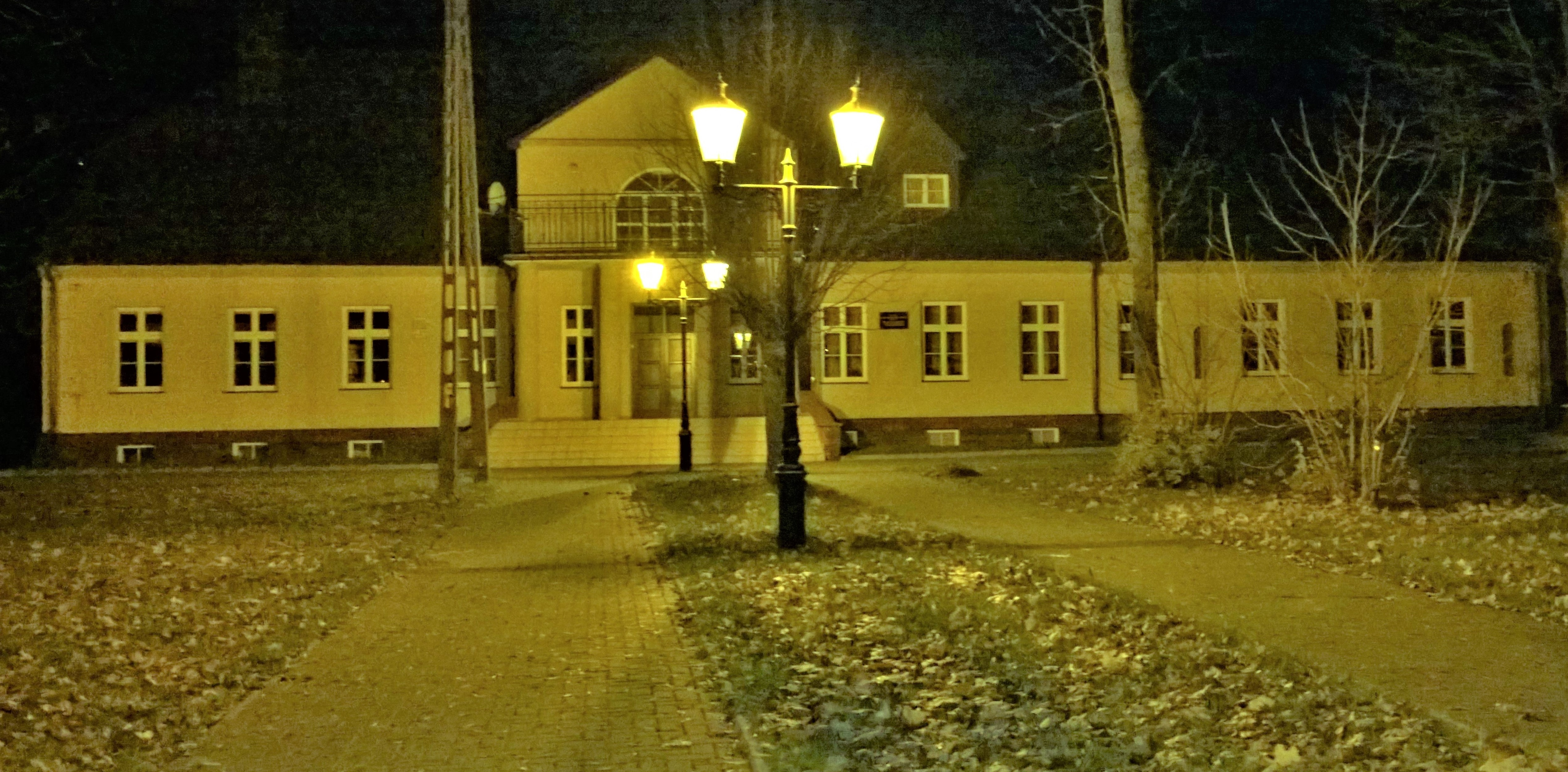 Zabytkowy zespół dworski należący kiedyś do Rembelińskich, Rozbielińskich i Skarżyńskich datowanym na II połowę XVIII-XIX w.